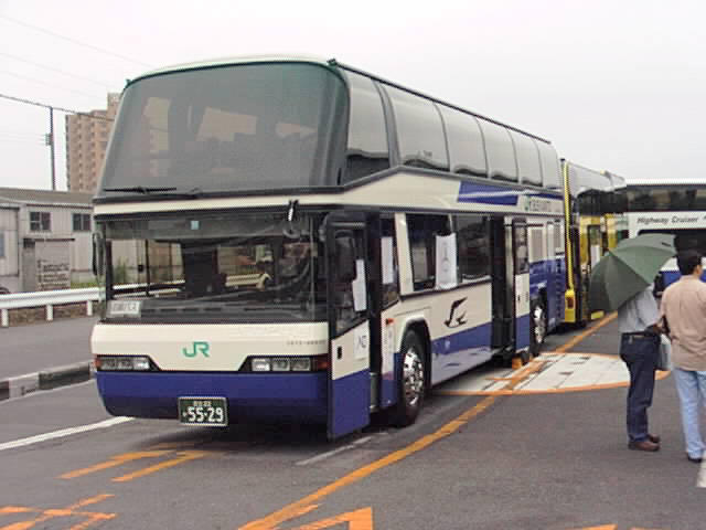 JR Bus Kanto（ジェイアールバス関東）D670-98502 Neoplan Skyliner N122/3, Japan-Version ネオプラン・スカイライナーN122/3 日本仕様車 東京支店のイベント時に撮影 Photo by Cassiopeia_sweet.